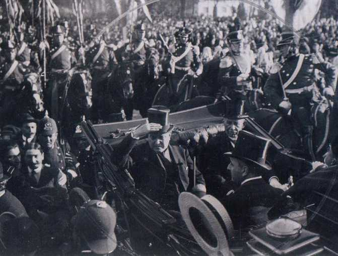 Yrigoyen saluda a la multitud desde el carruaje presidencial.